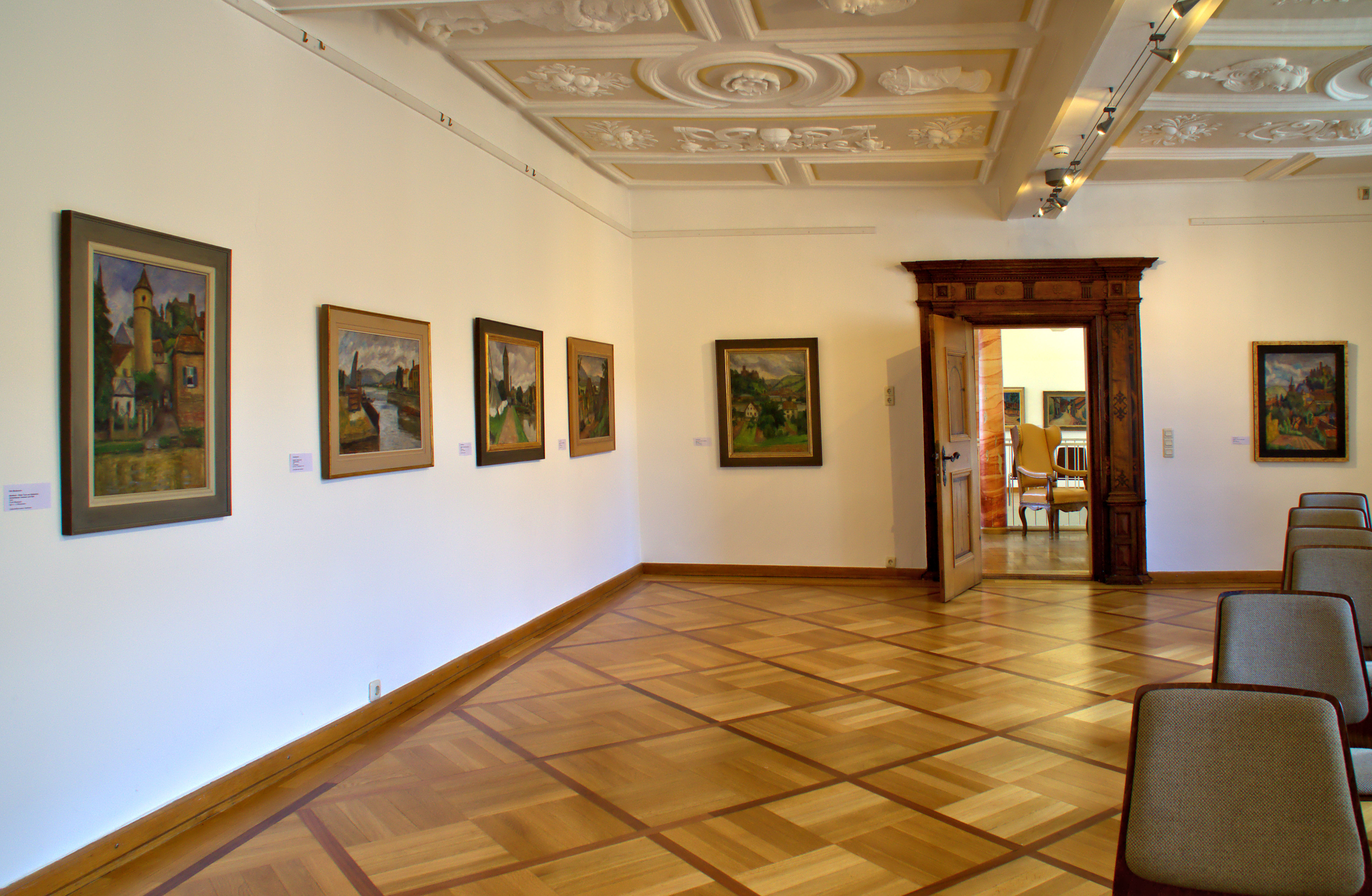 Otto-Modersohn-Kabinett im Grafschaftsmuseum Wertheim, Teilansicht (nur Gemälde Otto Modersohns)